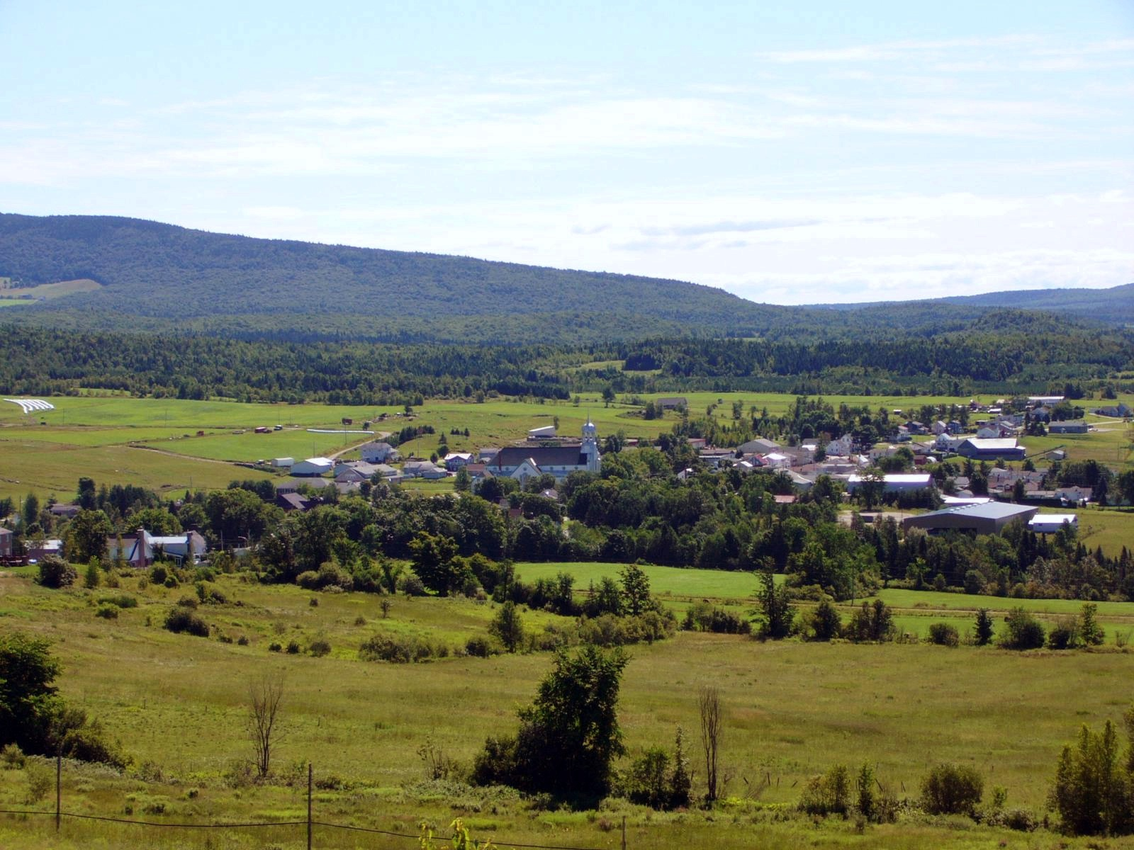 Village de Ham-Nord vu du haut du Rang St-Philippe.